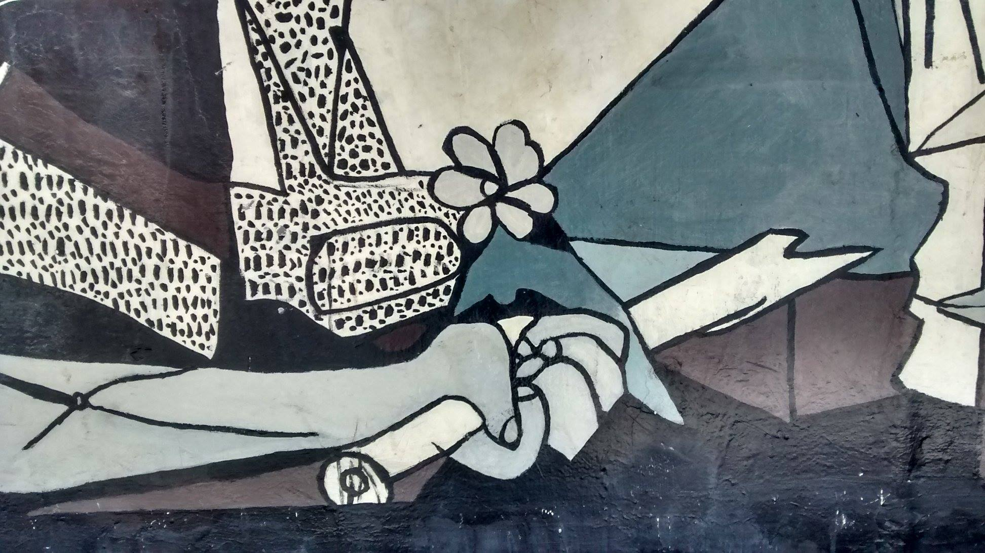 Pinturas de muralismo urbano público, en calle Carmen Covarrubias esquina Irarrázabal, en la comuna de Ñuñoa, Santiago de Chile.